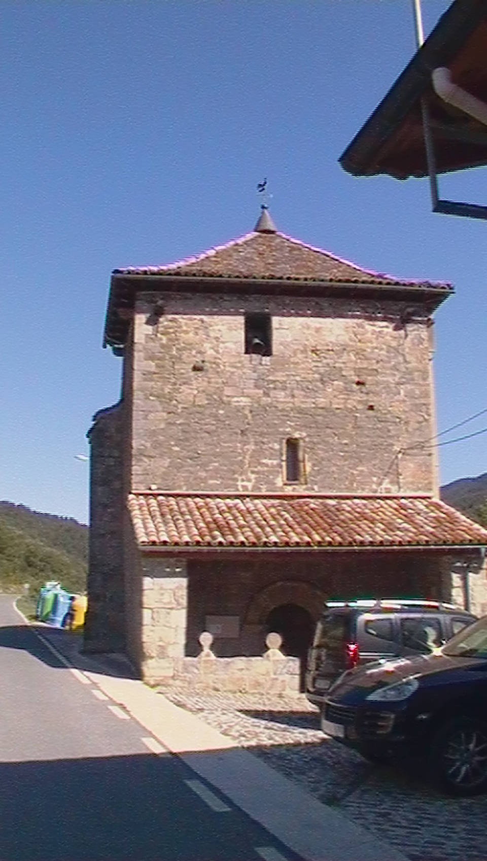 Igal - Parroquia de San Vicente, en otros tiempos iglesia monástica